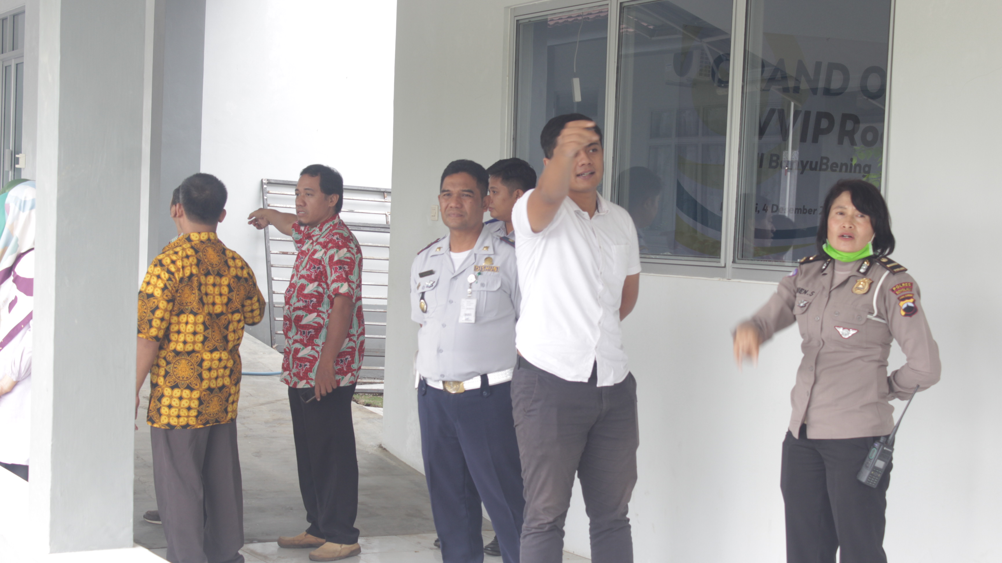 Kegiatan pembahasan andalali